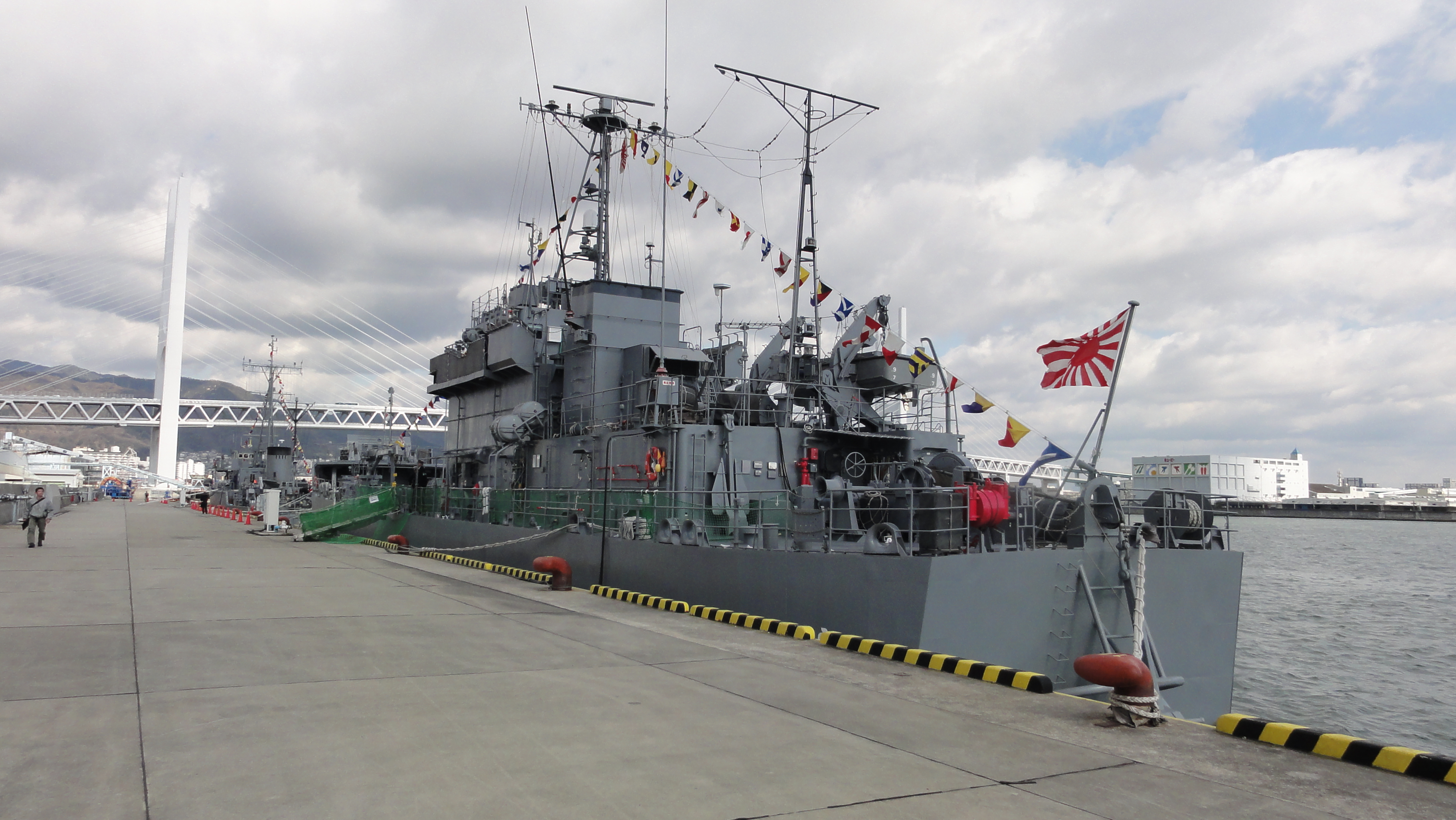 輸送艦ゆら（LSU-4171）を後部から 12年2月11日 海上自衛隊阪神基地にて